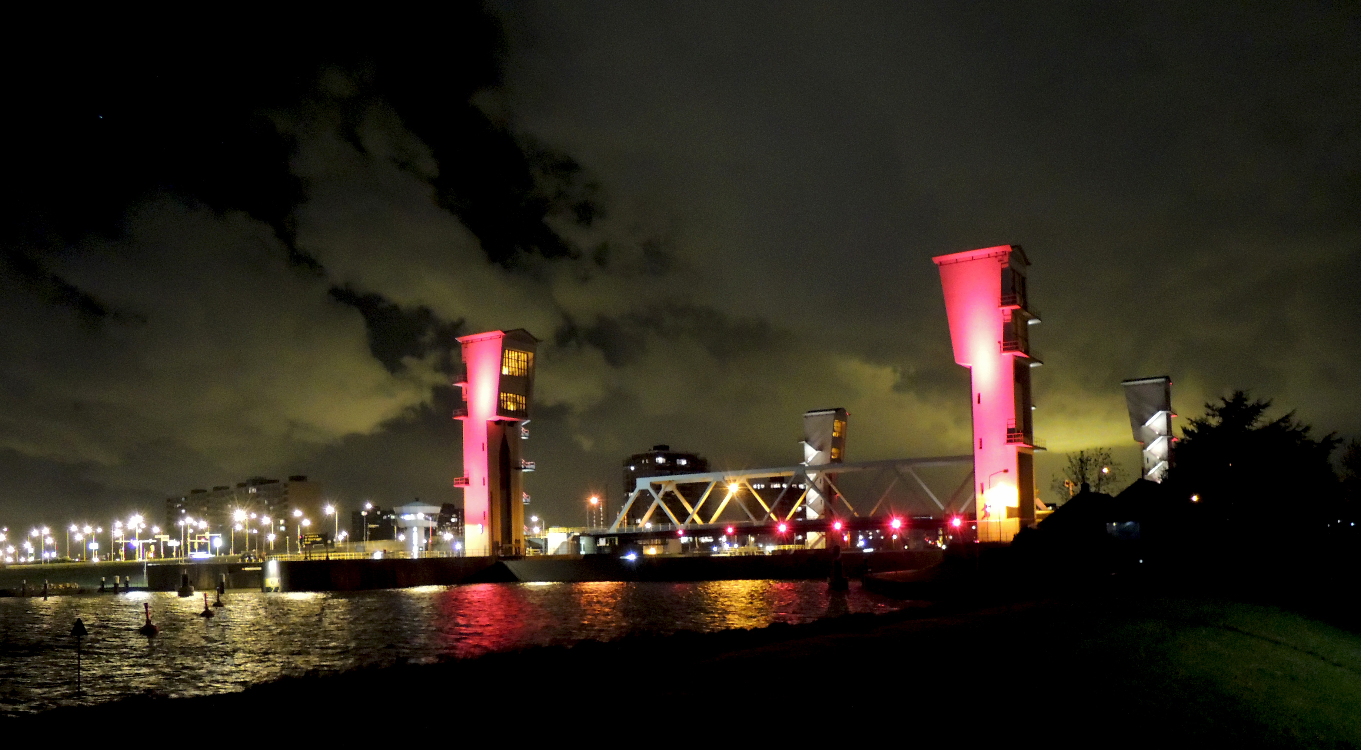 Gesloten stormvloedkering Hollandse IJssel met rood verlichtte torens.